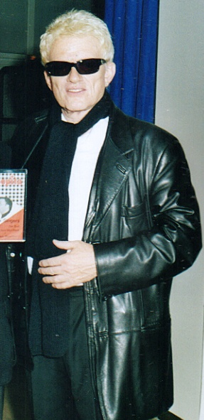 Heino (German singer)